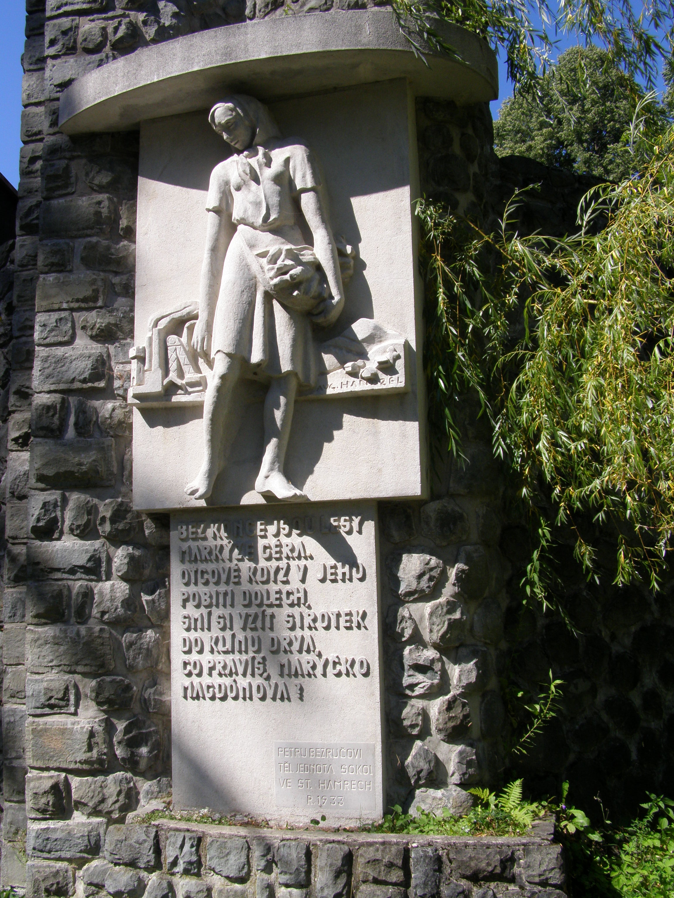 Staré Hamry, pomník Maryčky Magdonovy